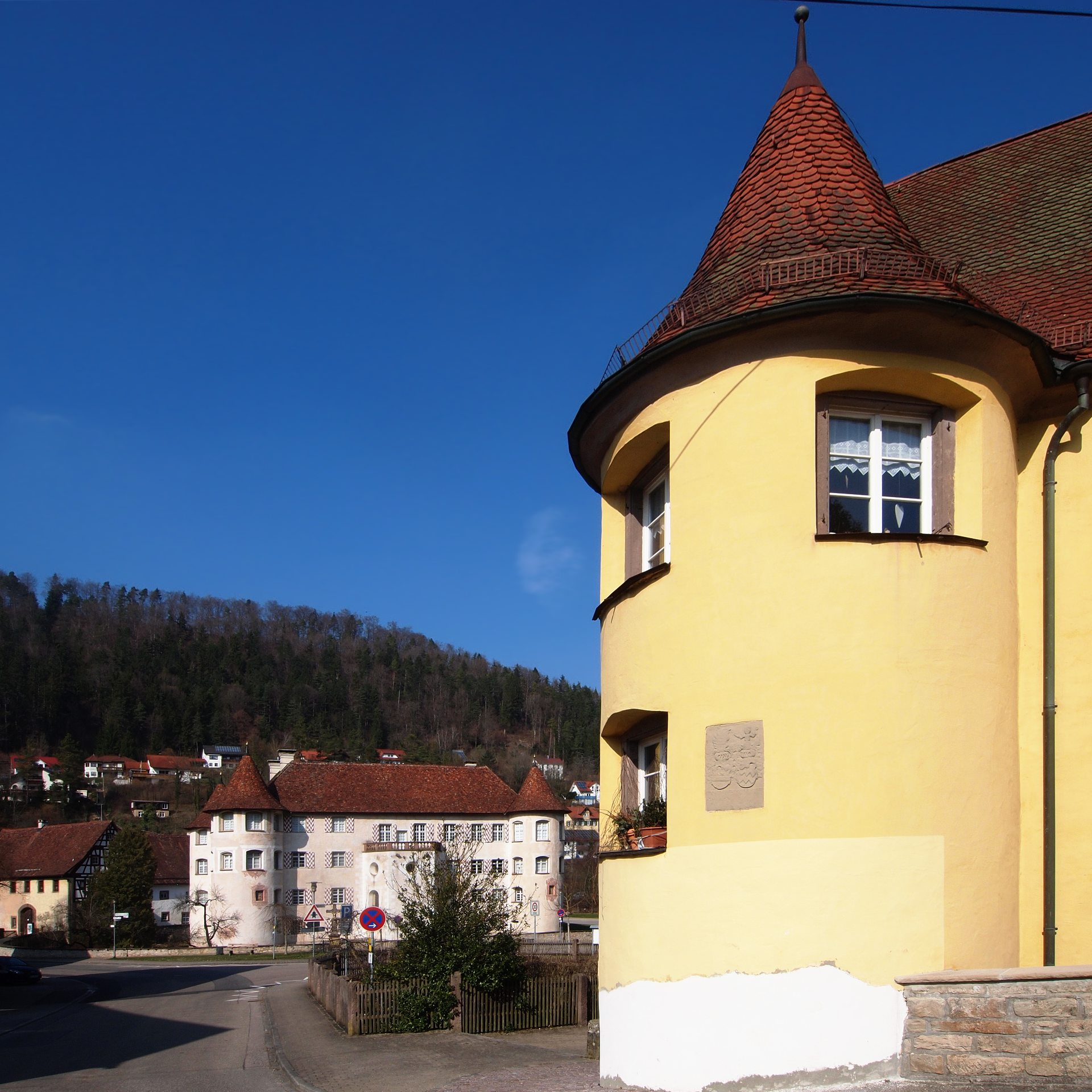 Pfarrhaus in Glatt, ehemals Neuneck-Schloss. Hinten das Wasserschloss.